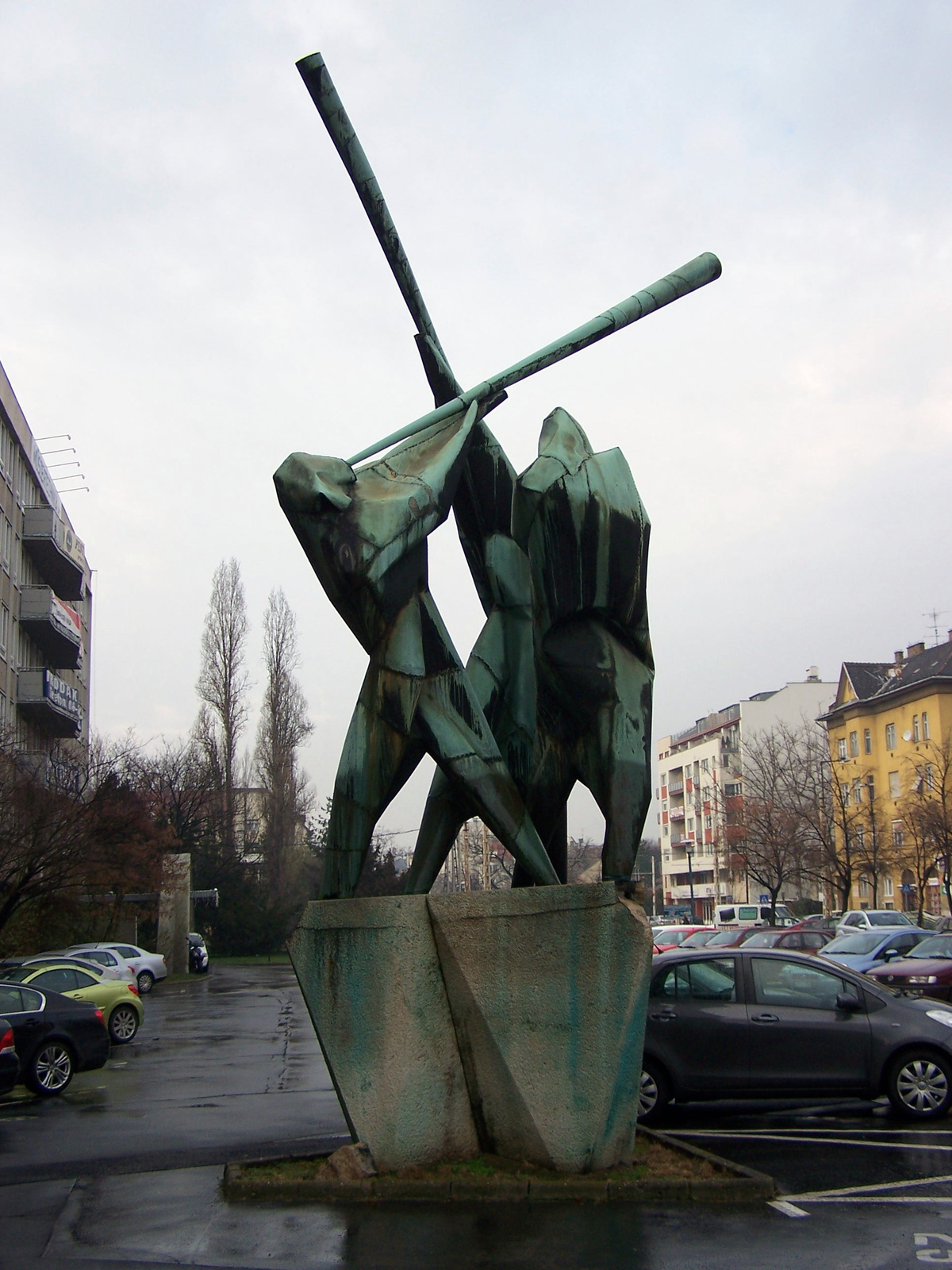 Kürtösök című szobor (Budapest XIV., Róna utca 120-122.) készítette: Vígh Tamás, 1967. This is a photo of a monument in Hungary. Identifier: 11206